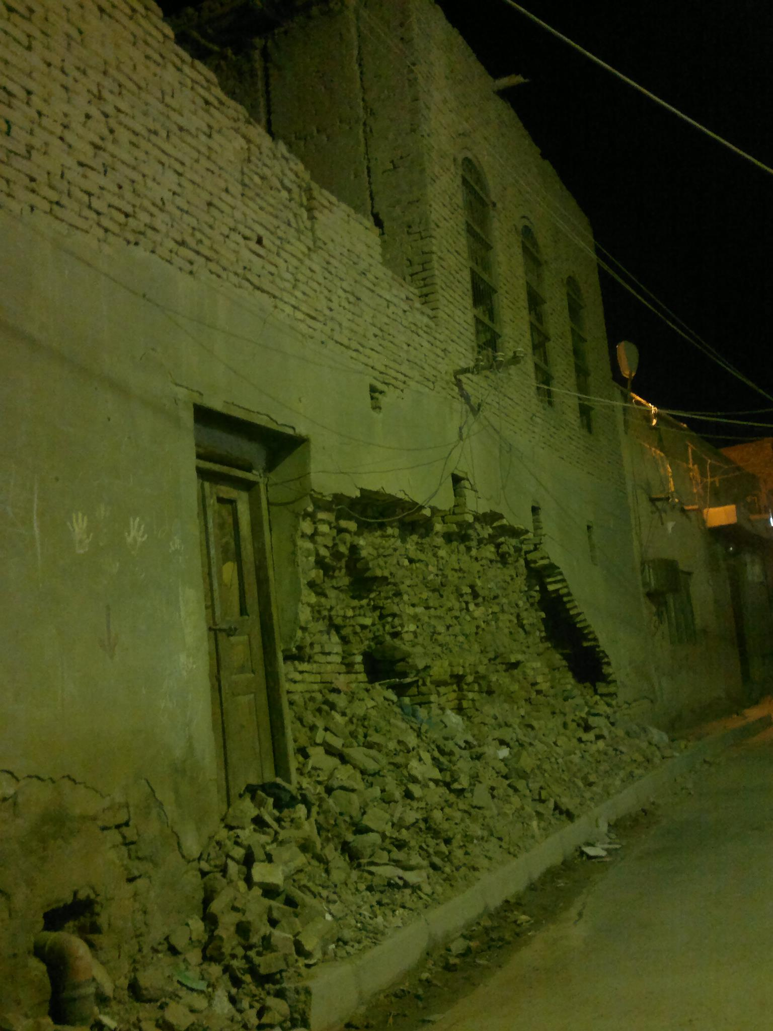 صوره لمبنى قديم في منطقه السراي في المجر الكبير